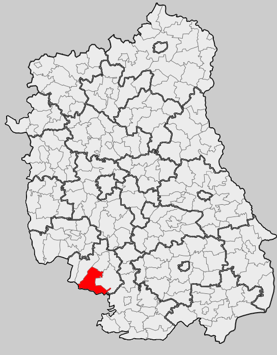 Map of gmina Janów Lubelski, Janów Lubelski county, Lublin voivodship Mapa gminy Janów Lubelski, powiat janowski, województwo lubelskie